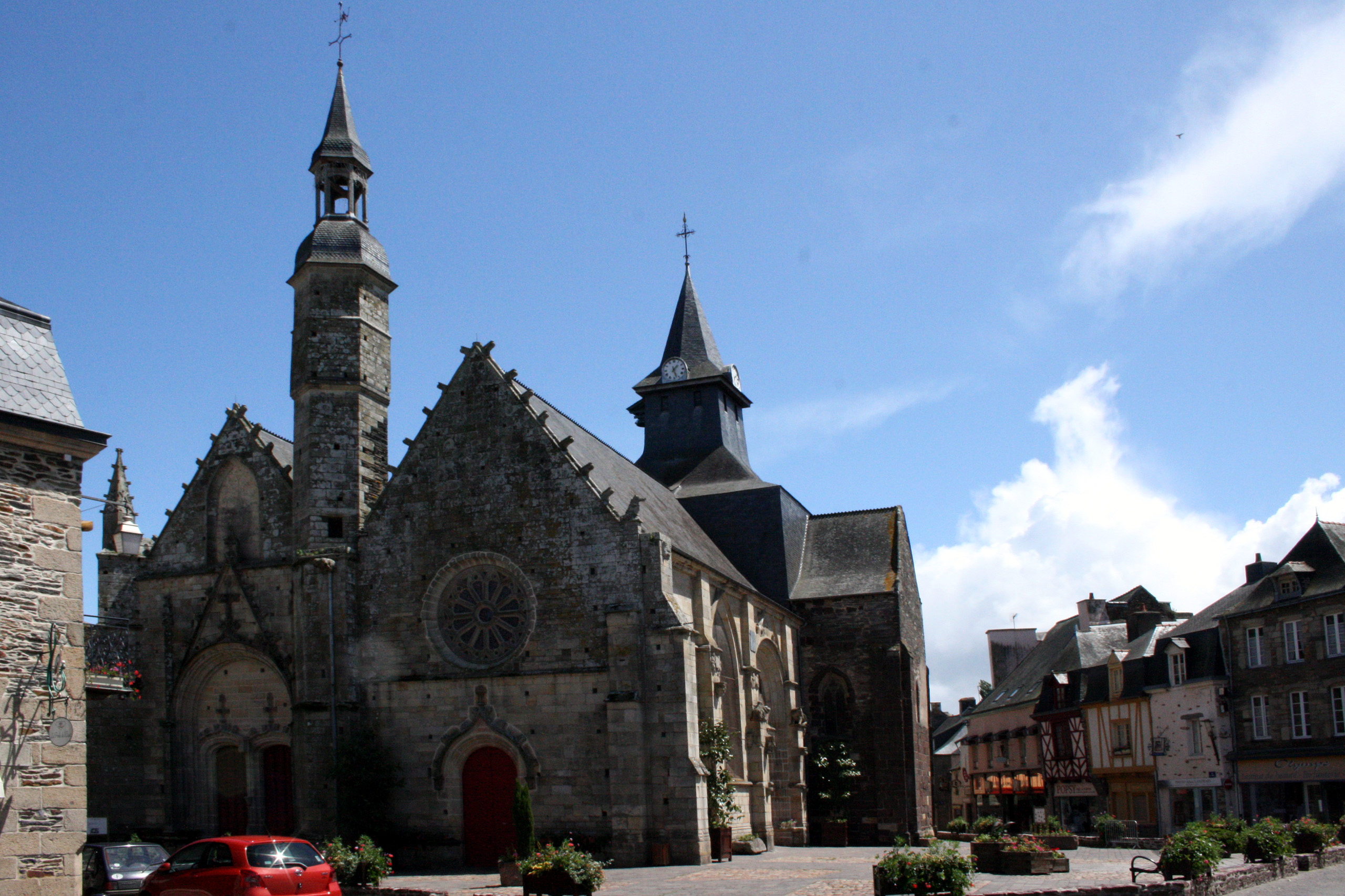 Eglise Saint-Gilles à Malestroit.